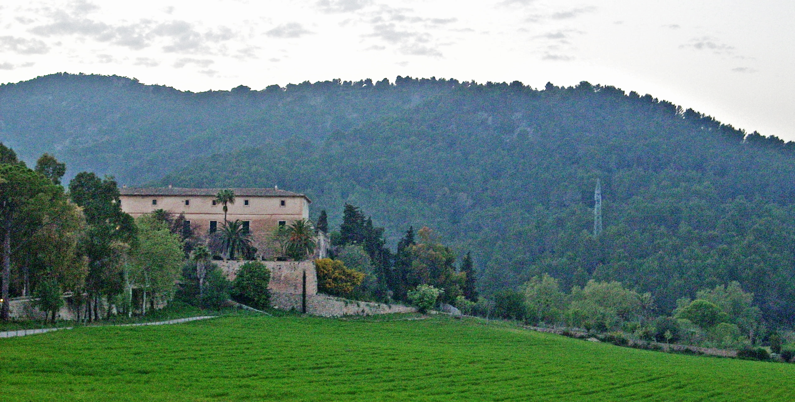 Sarrià Mallorca